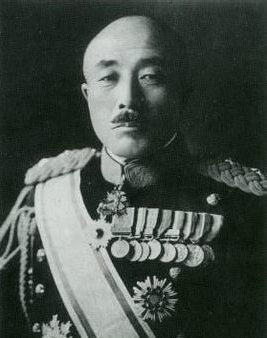 板垣征四郎（1885 - 1948）